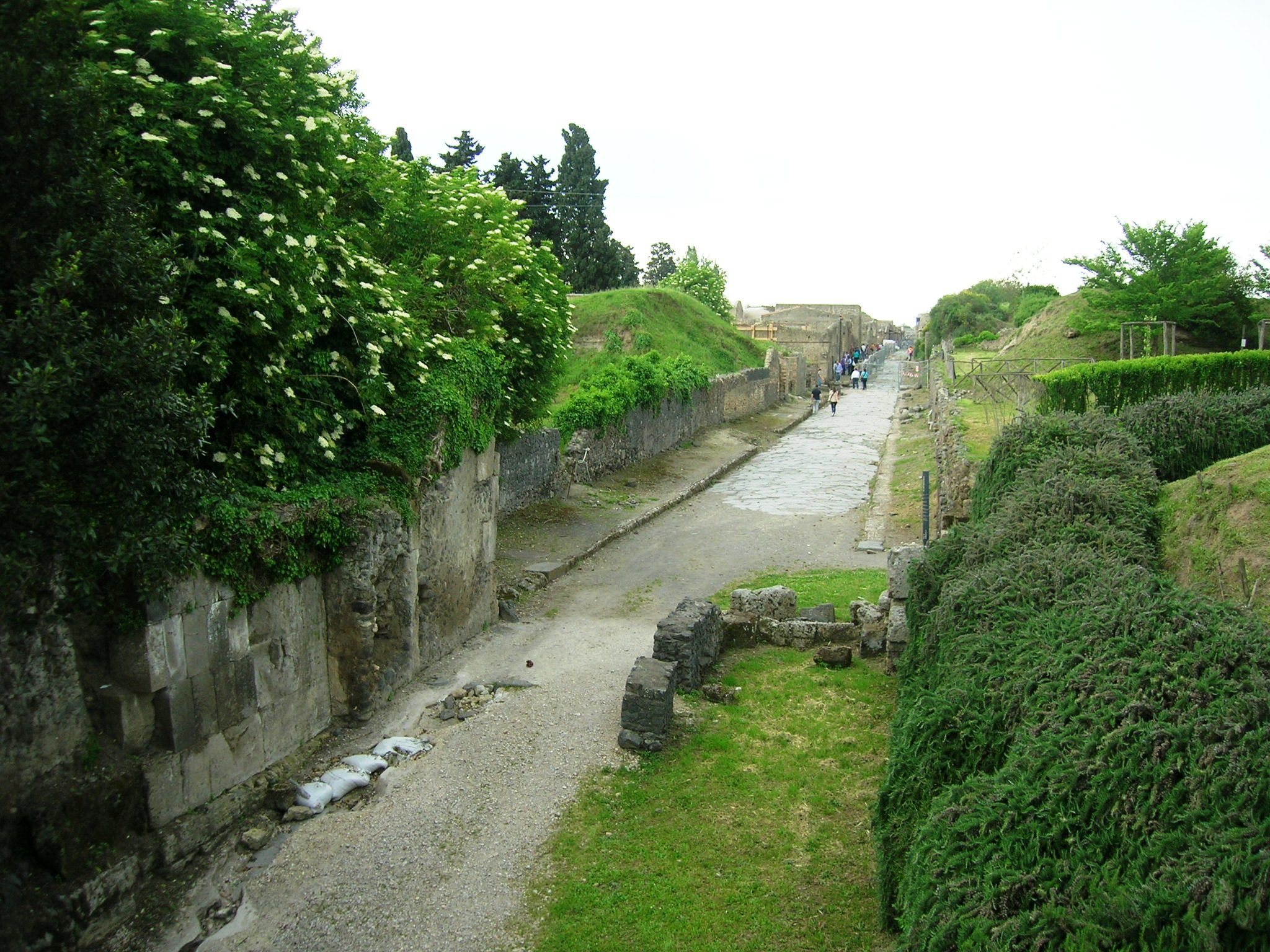 Veduta di Via dell'Abbondanza dalla Porta di Sarno.